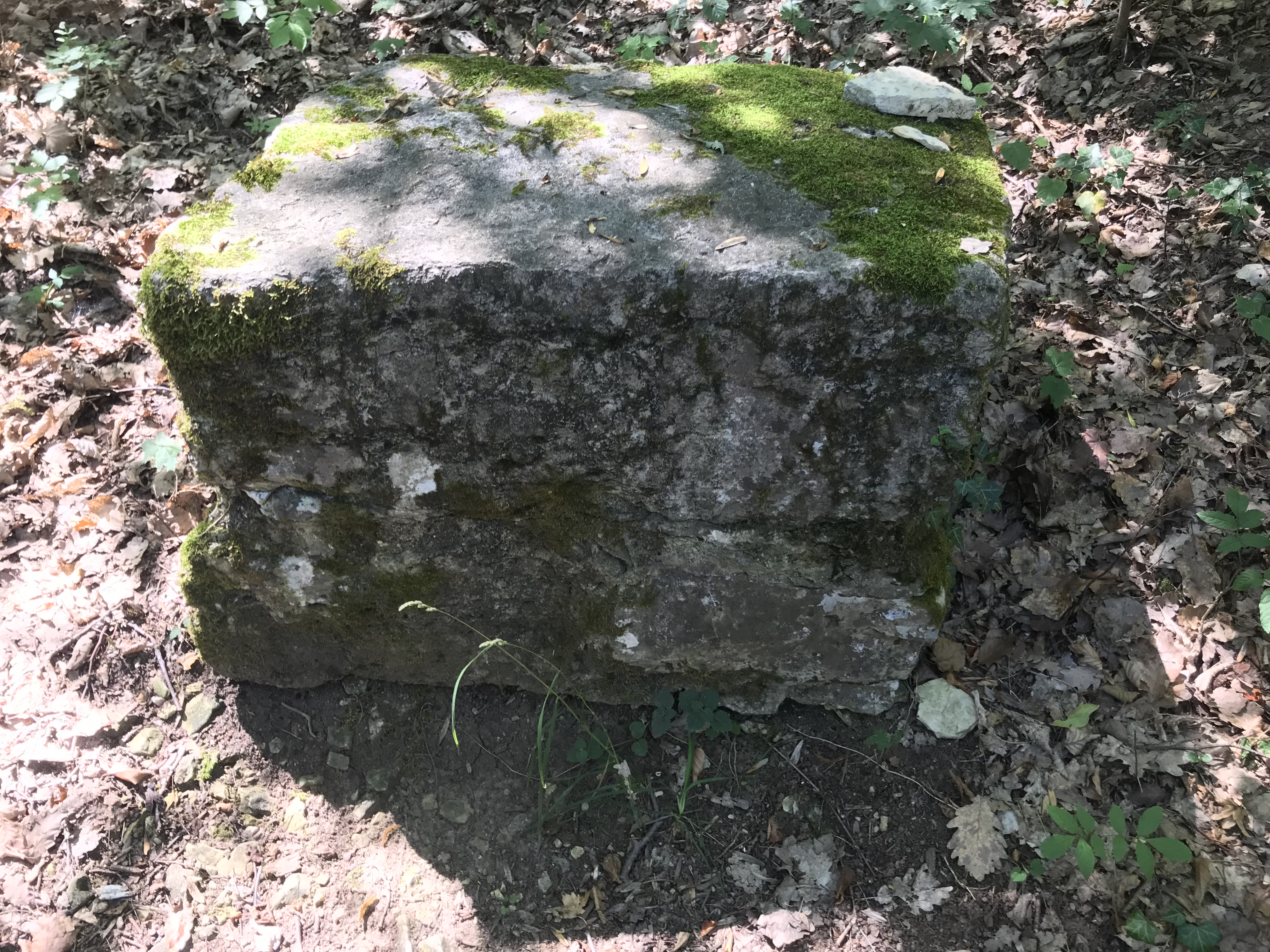 Erinnerungsstein für den Zweiten Pariser Frieden (1815) in der Fränkenauer Hohle, Bad Kösen